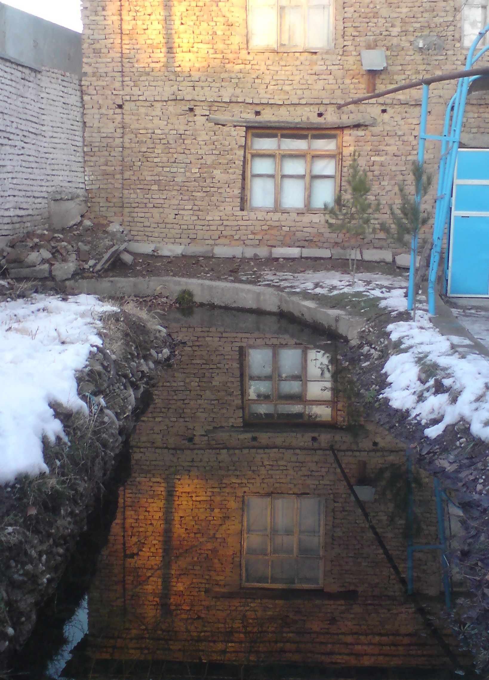 Канал Туртарык (Турт) в районе улицы Султония (бывшее Троицкое шоссе), город Ташкент